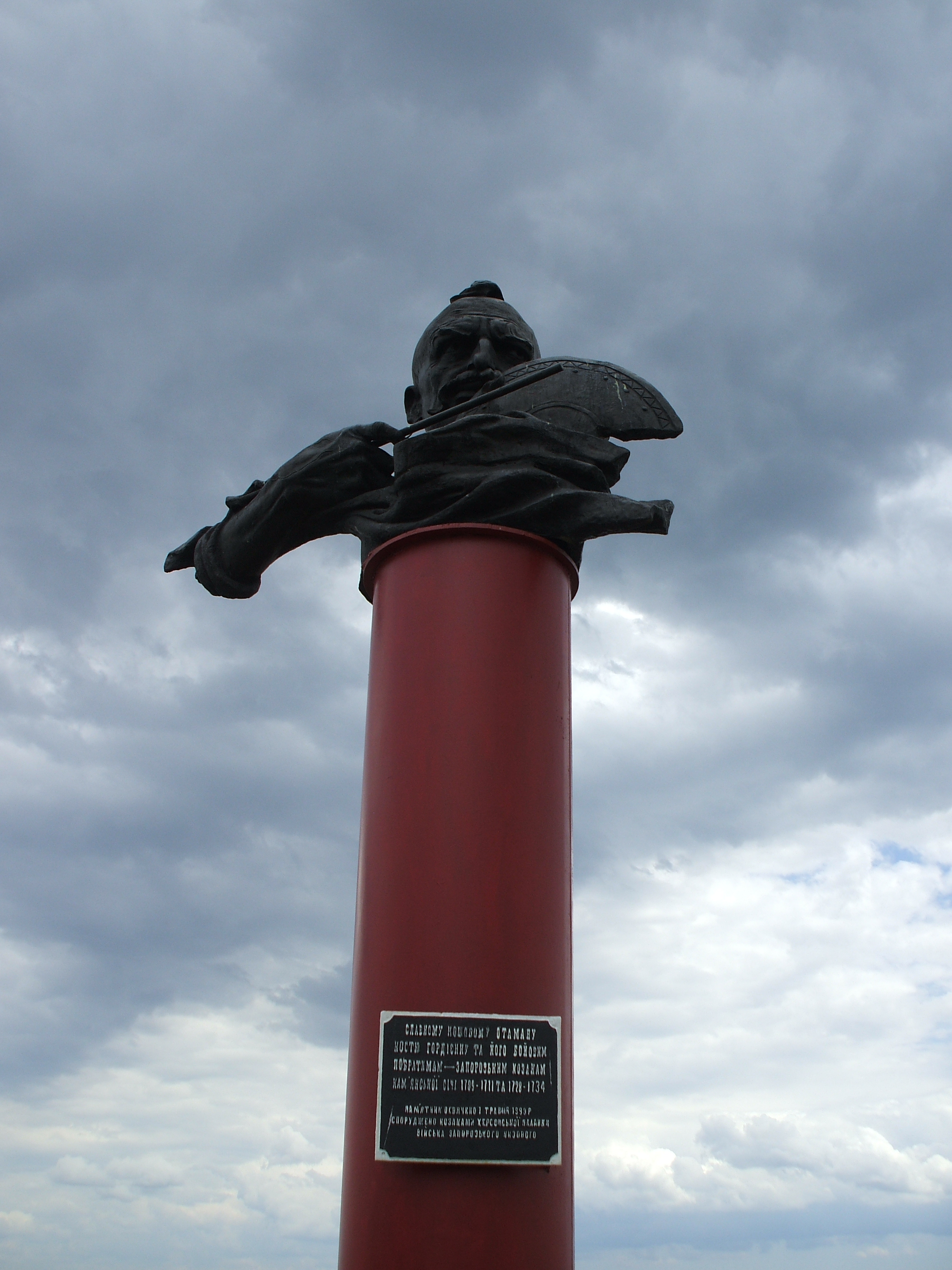 запорожцям Камянської січі від козацтва